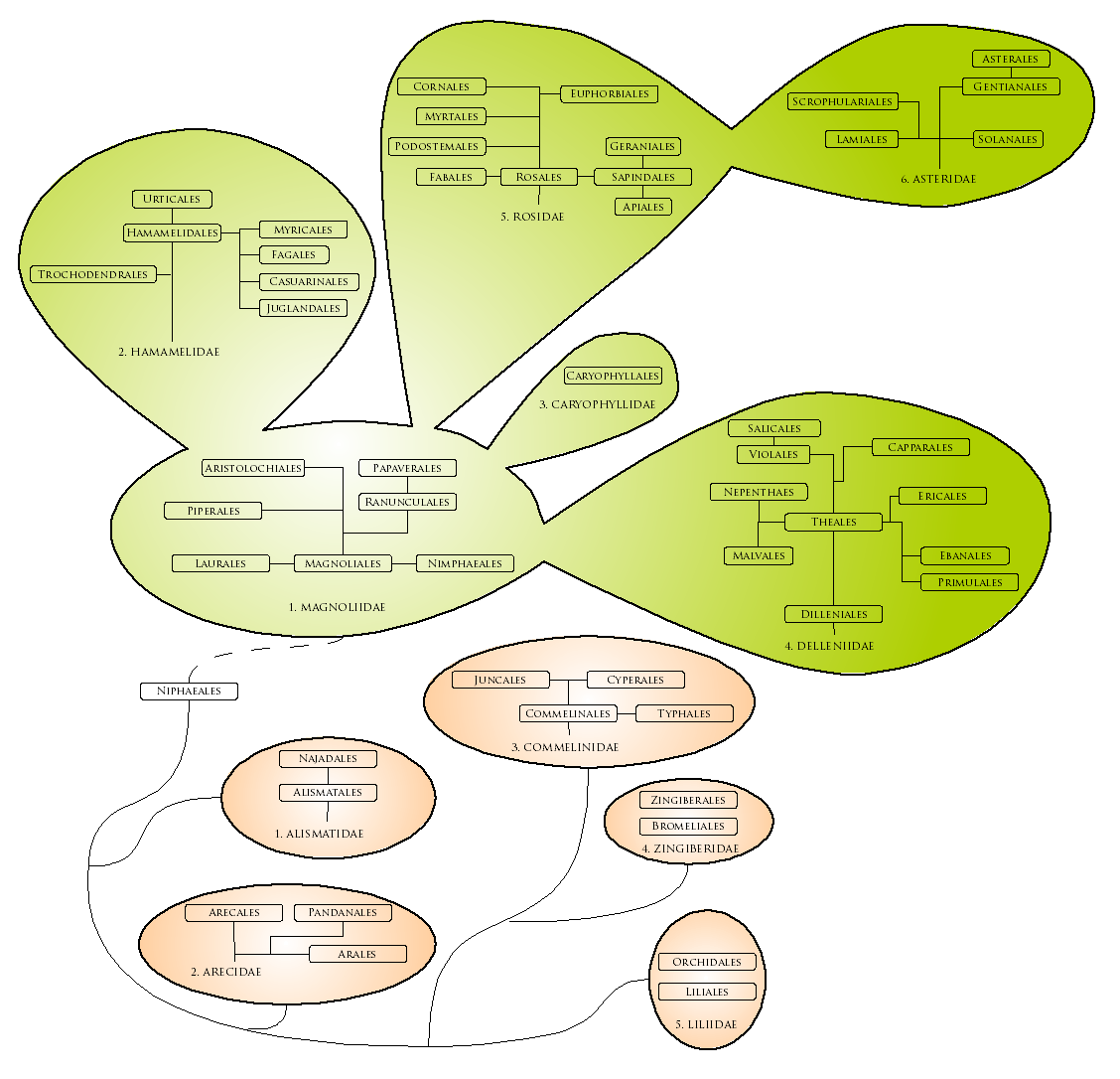 Schema evolutivo delle Magnoliphyta